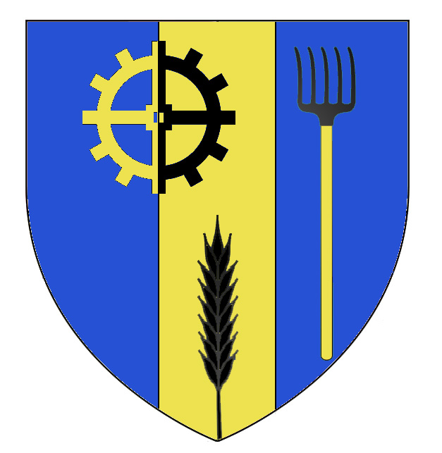 Blasón heráldico propuesto para la localidad de Laborde,Córdoba.